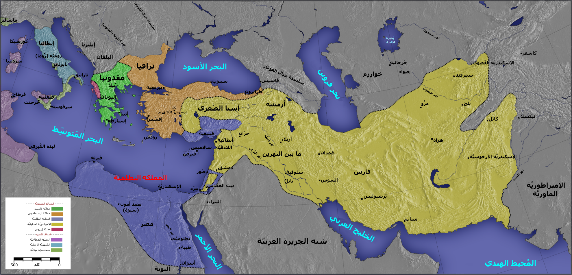 Ptolemaic Empire map in Arabic.